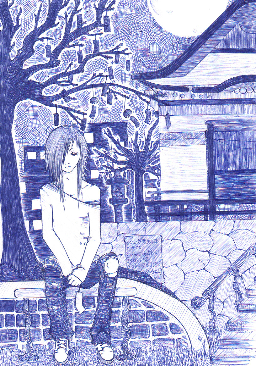 2. Platz des Wikipedia-Wettbewerbs bei Animexx in der Kategorie Beste Idee.